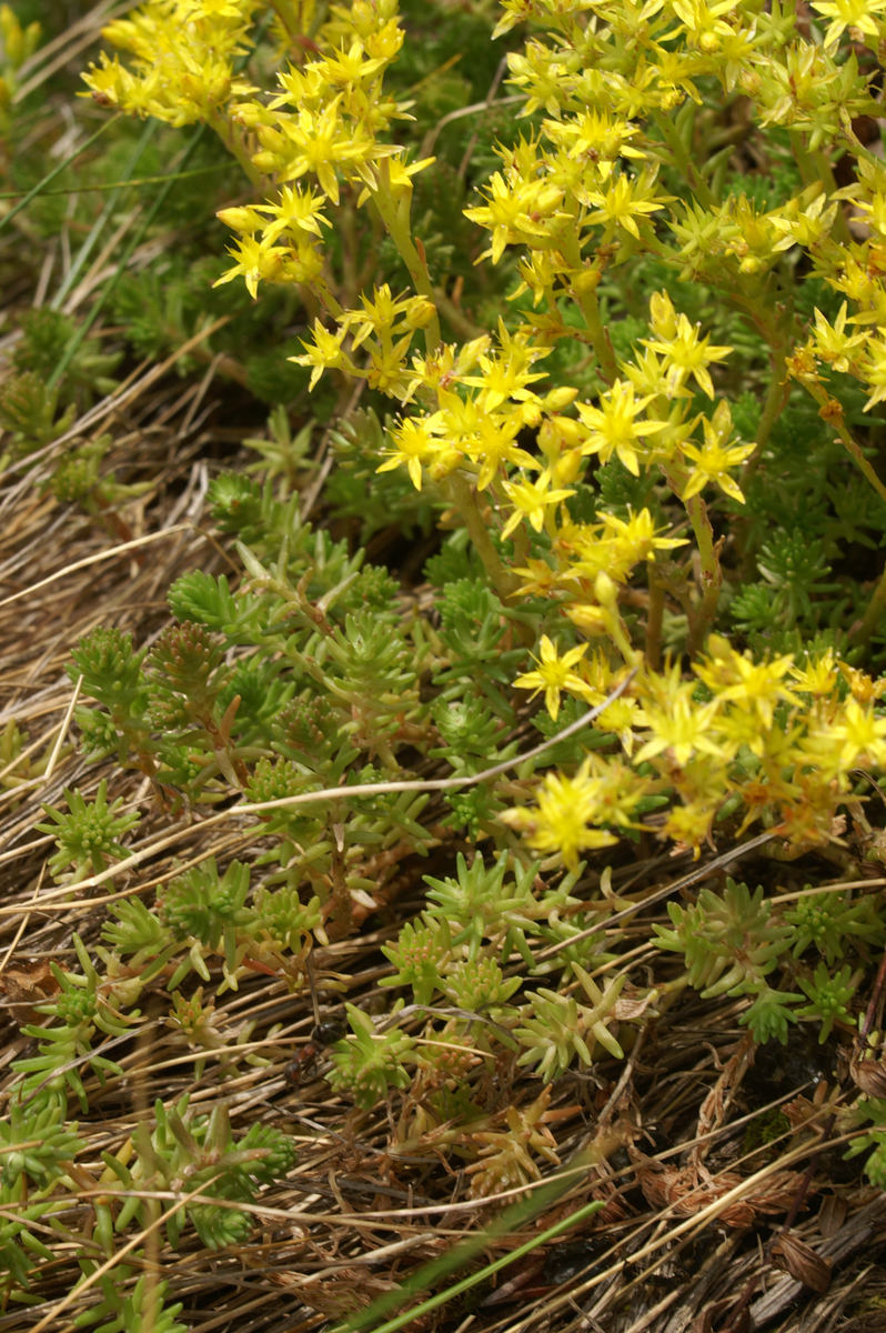 Šesterokotna homulica na Jerebici.